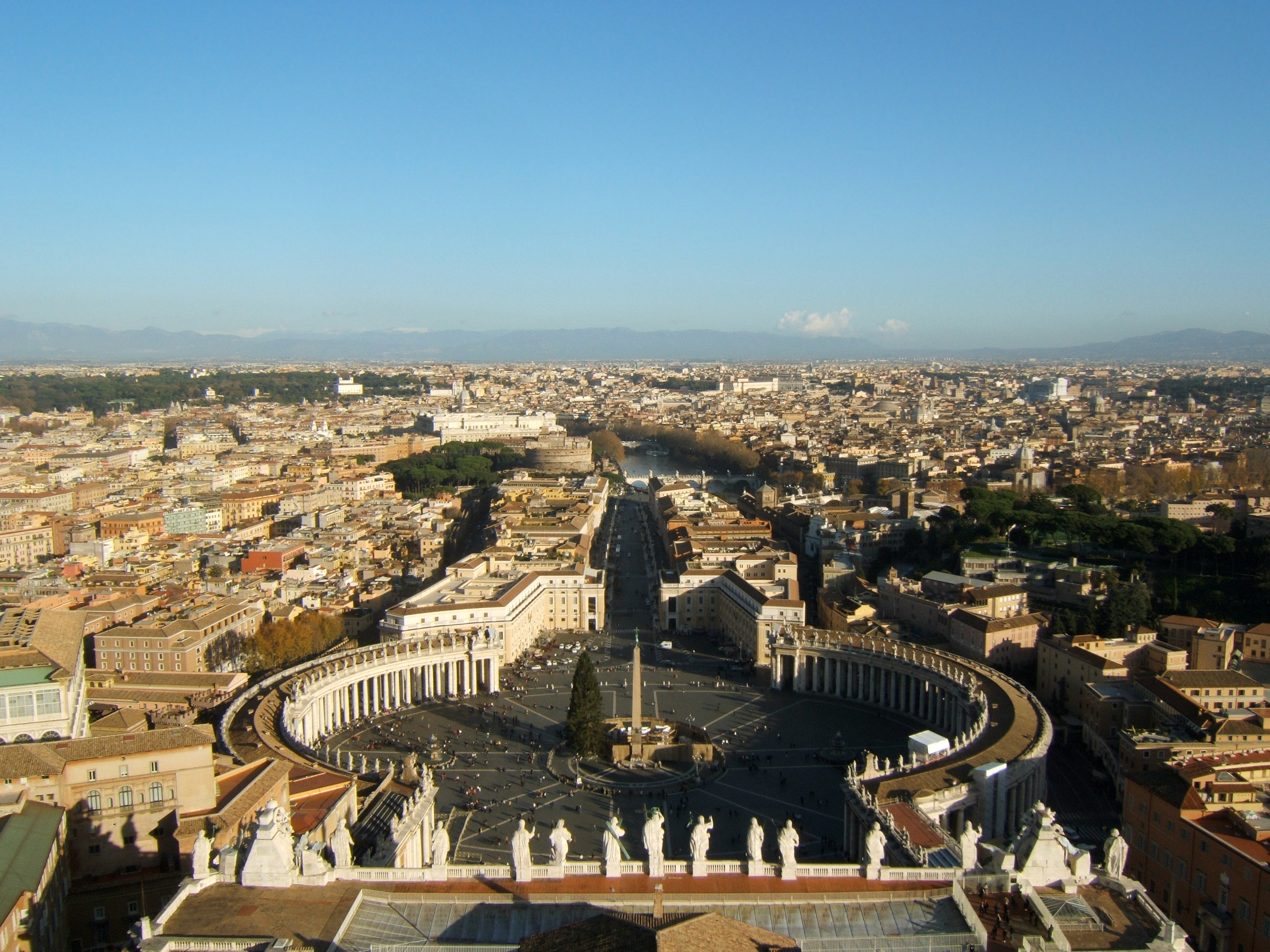 Rome et la Place Saint-Pierre vues du haut de la coupole de la Basilique. À l'horizon, la chaîne des Apennins.